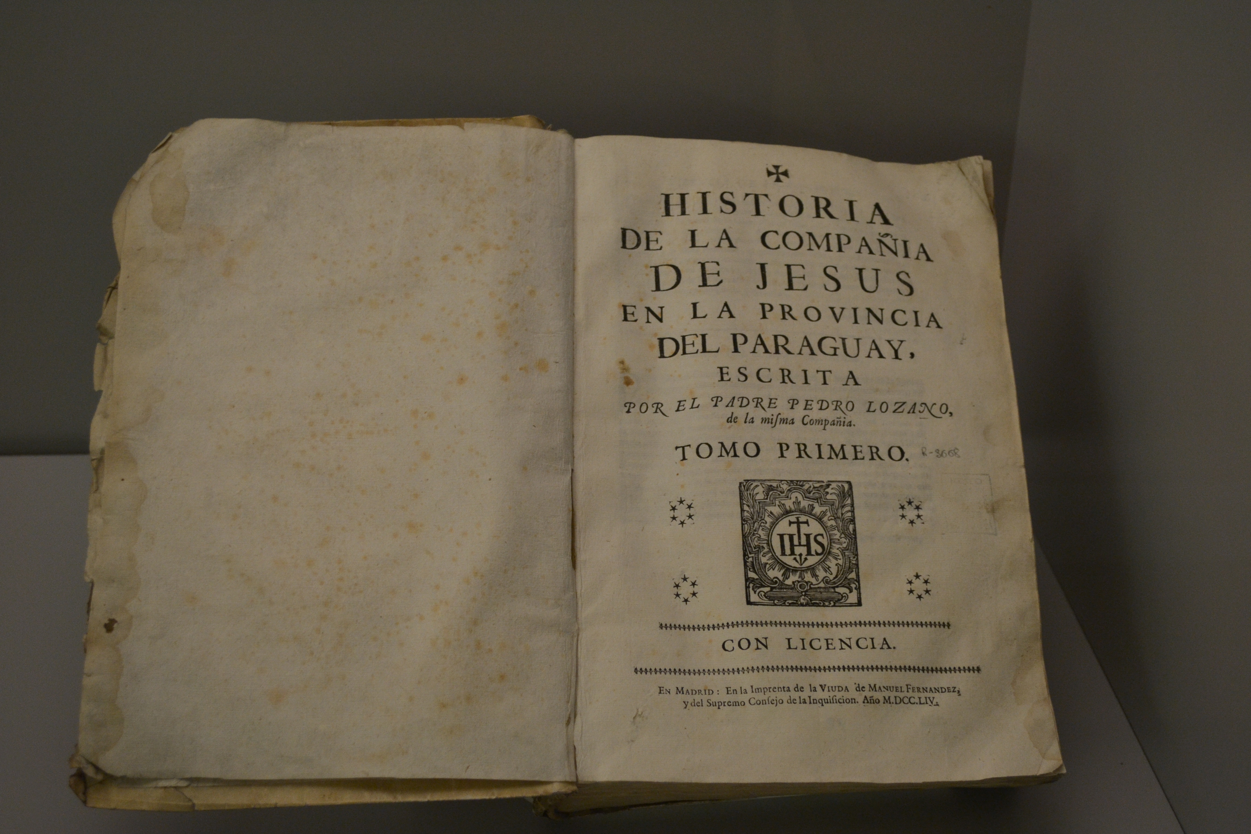 Historia de la Compañía de la Jesús de la provincia del Paraguay, obra de Pedro Lozano. Madrid, 1755. Museo de América.